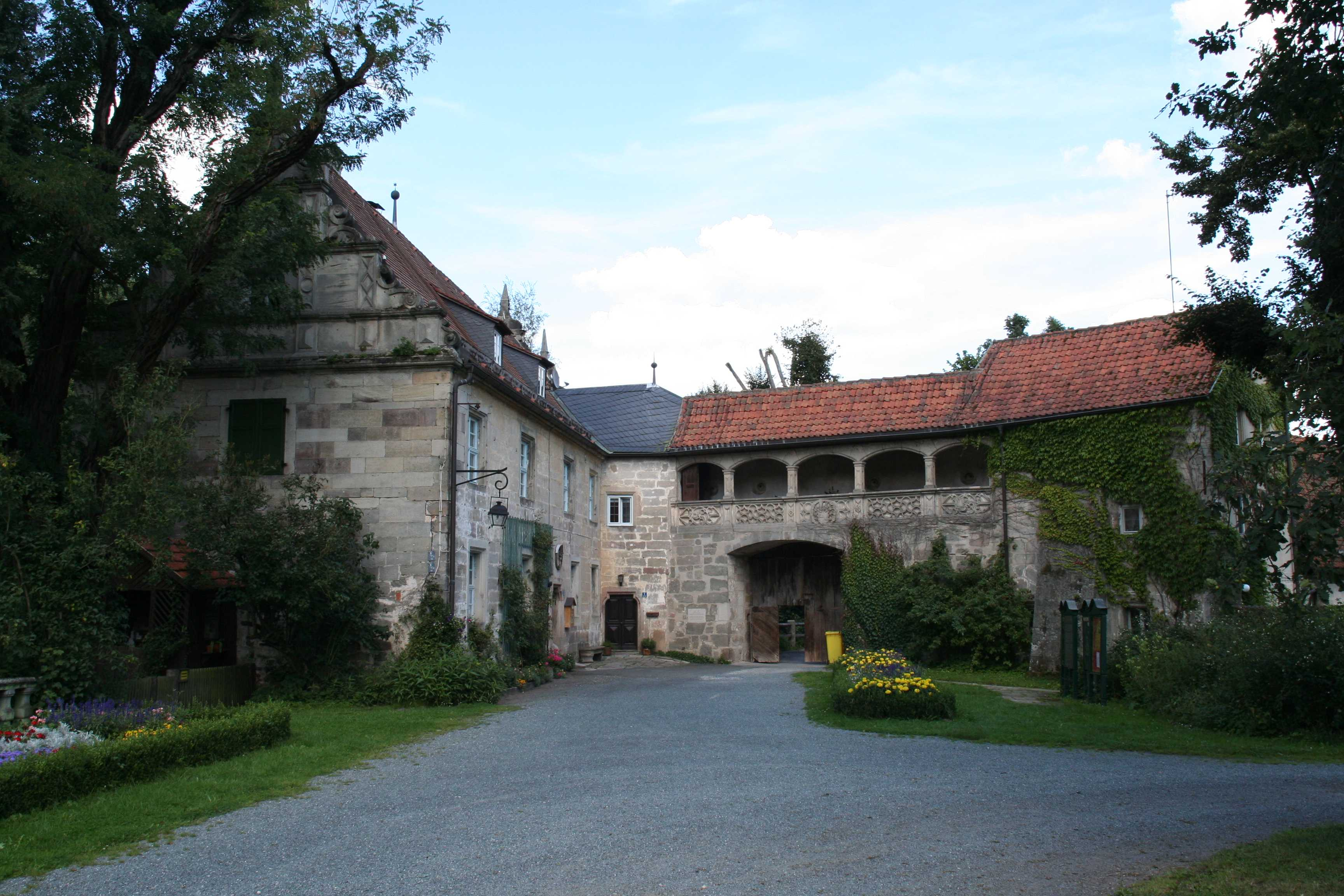 Wasserschloss Mitwitz (Torbau) im Landkreis Kronach in Bayern